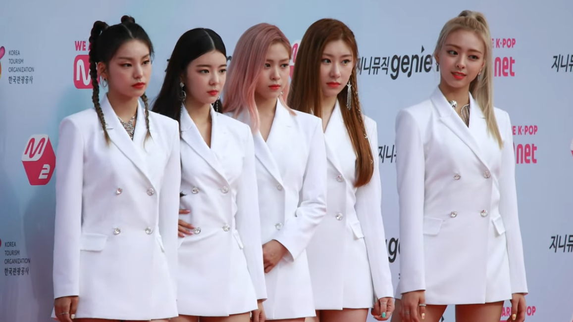 Itzy no tapete vermelho do MGMA, em 1 de agosto de 2019